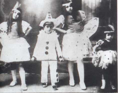 Eva Perón (derecha) y sus hermanos. Carnaval. Los Toldos